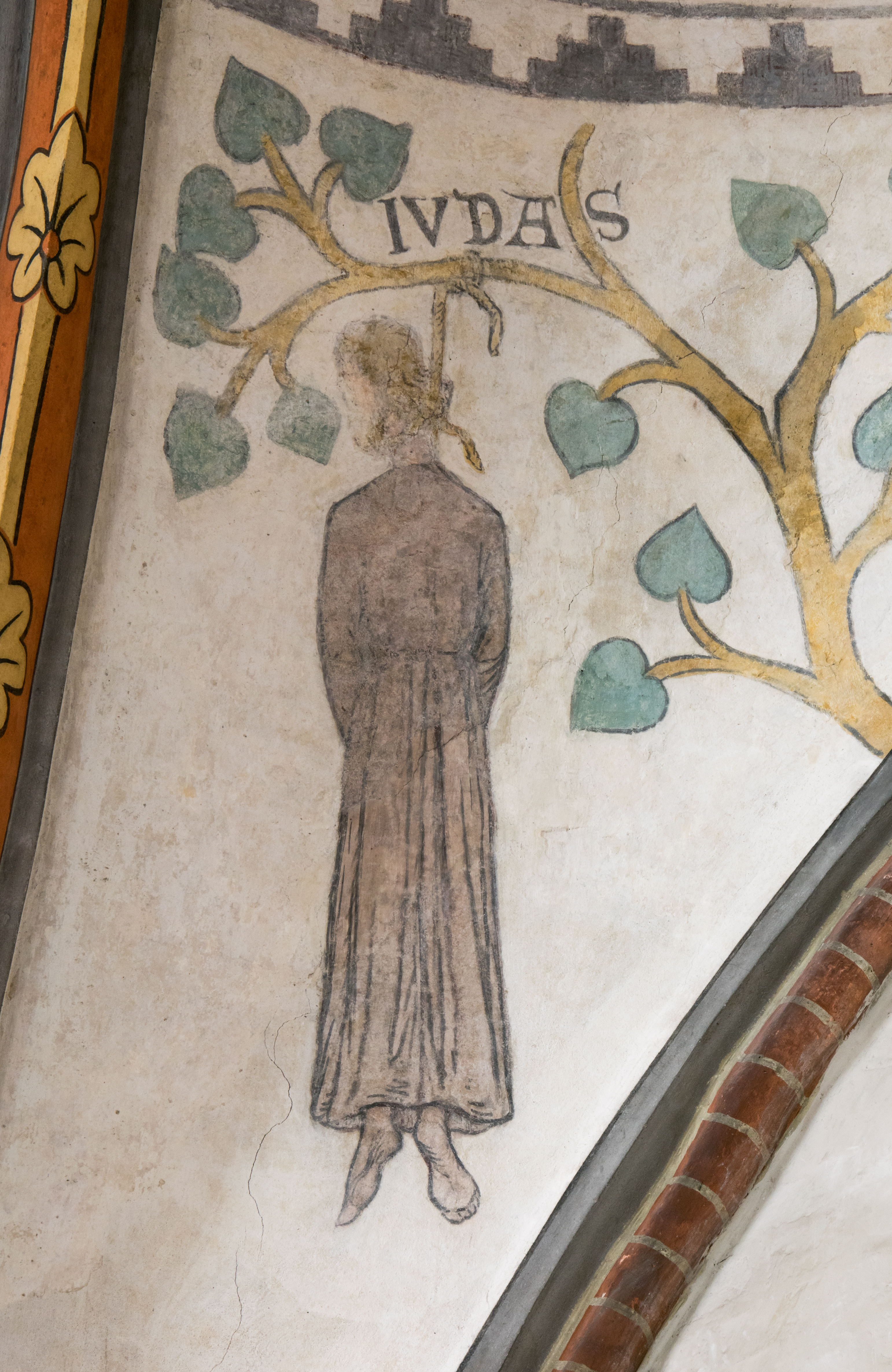 Teterow St. Peter und Paul Judasabbildung